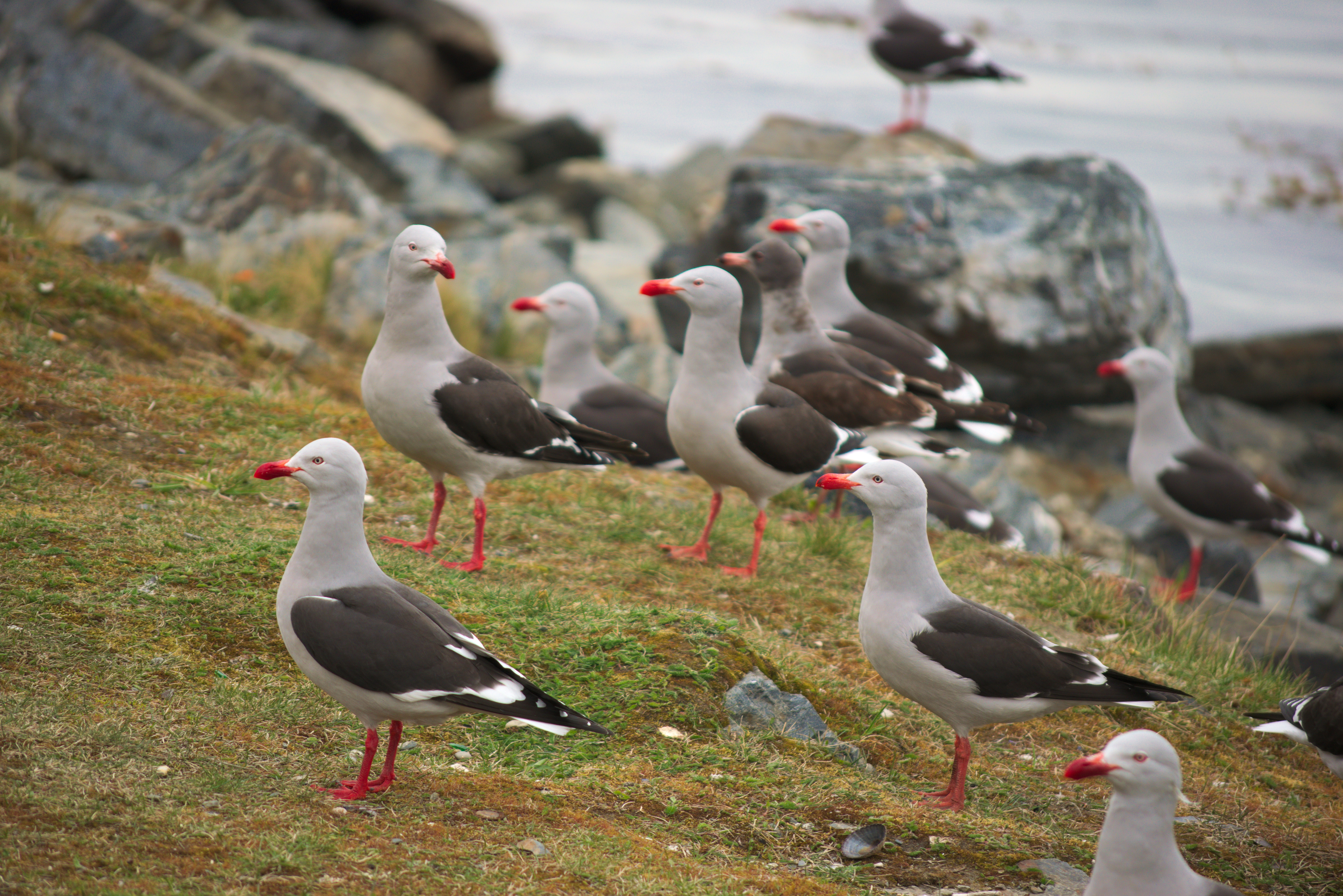 Grupo de gaviotas grises australes (Leucophaeus scoresbii) en la costa de Ushuaia (Argentina)